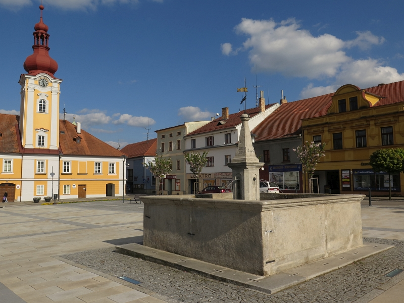 Kašna s pranýřem, Náměstí, proti čp. 43, Kaplice.